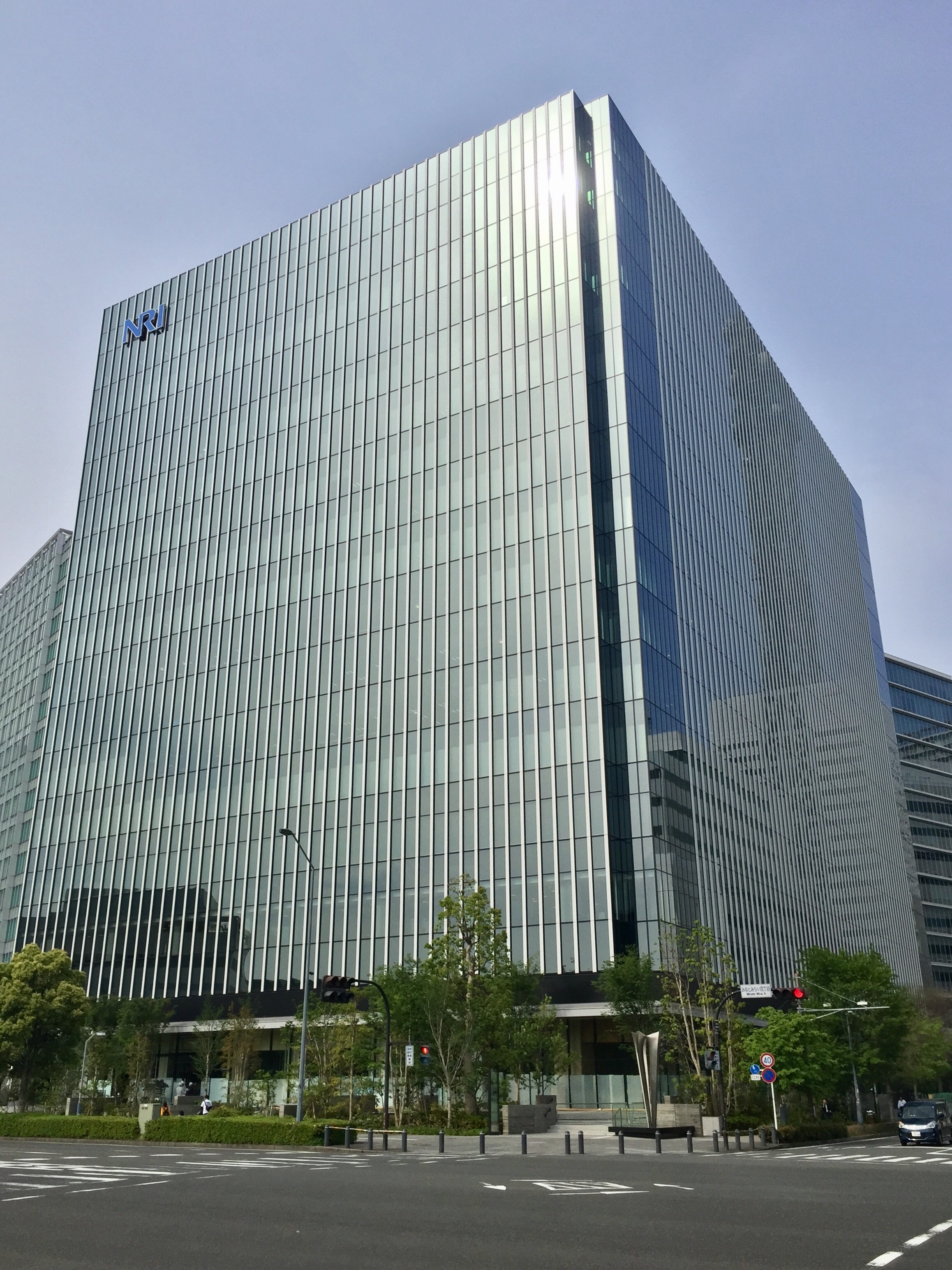 みなとみらい地区46街区のオフィスビル「横浜野村ビル」の外観（南西・みなとみらい大通り側）。